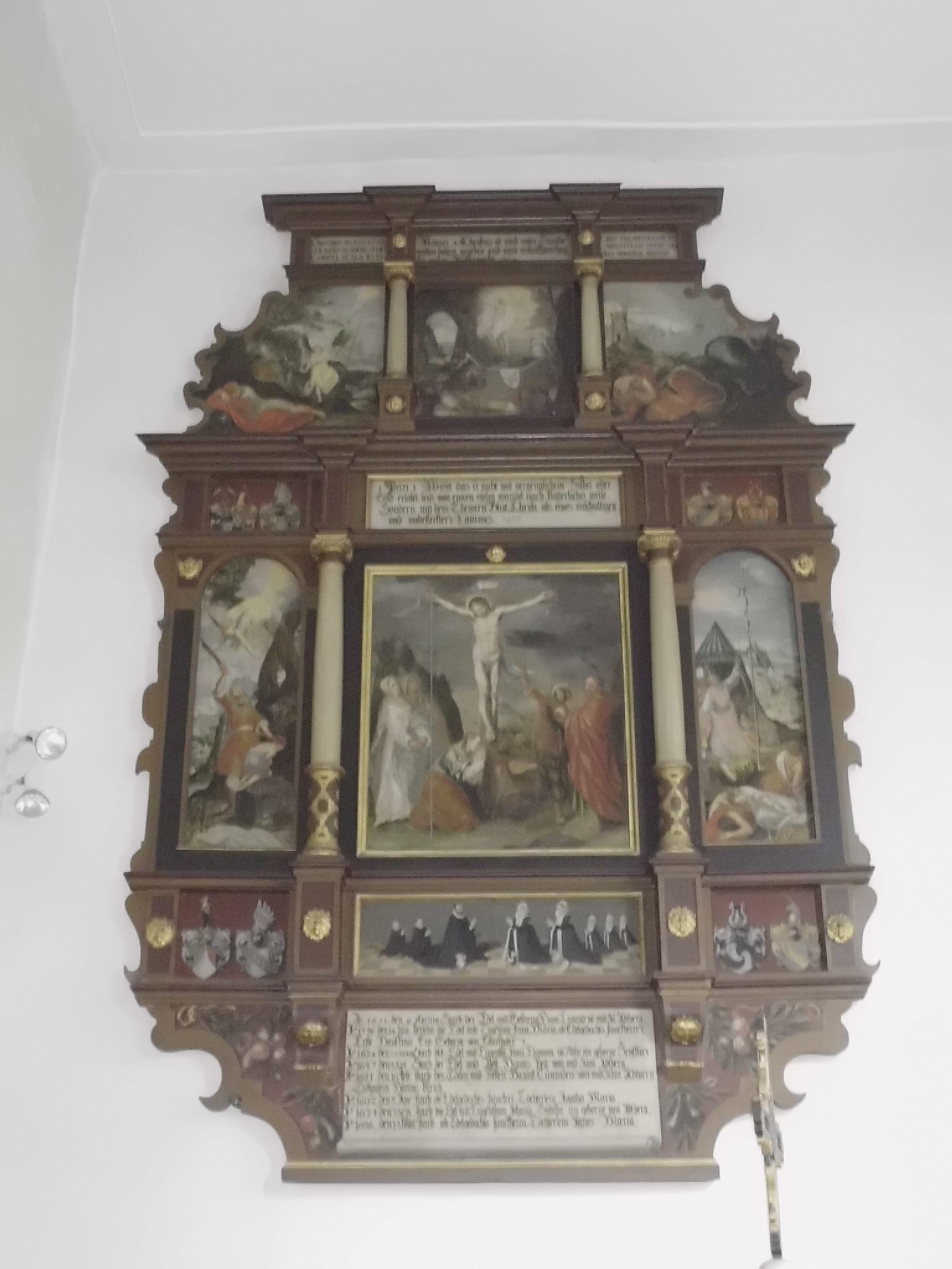 Absberg (Landkreis eißenburg-Gunzenhausen, Bayern, Christus-Kirche, Epitaph des Hans Konrad von Absberg an der Chornordwand